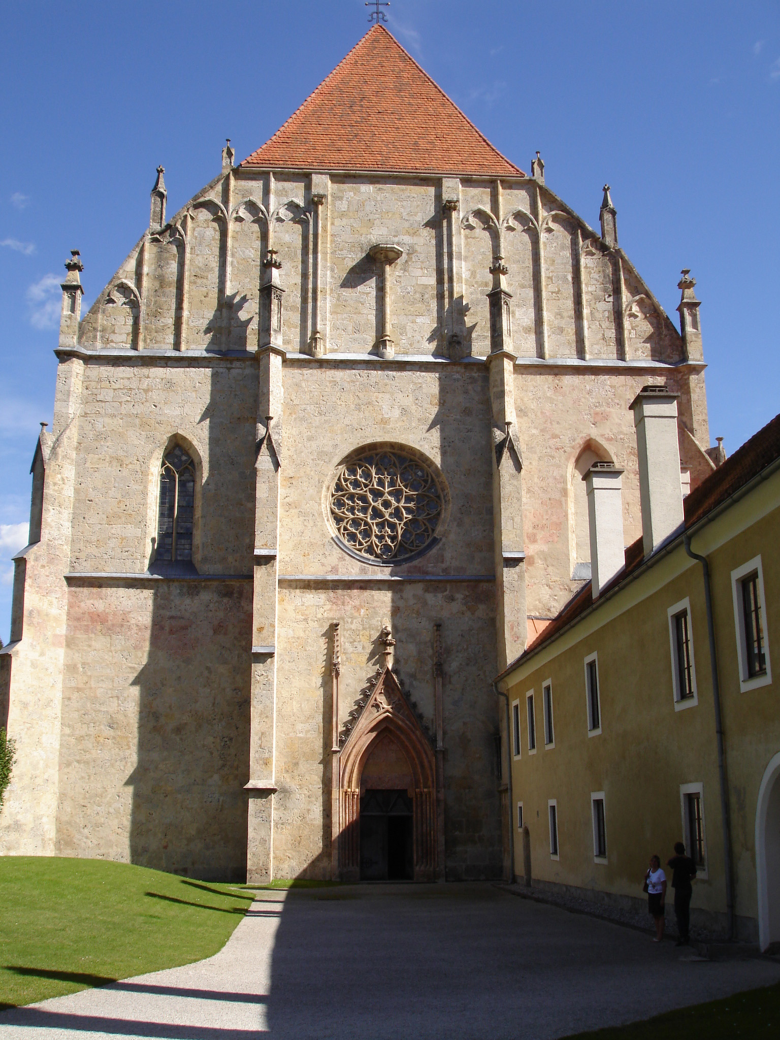 Münster Neuberg an der Mürz